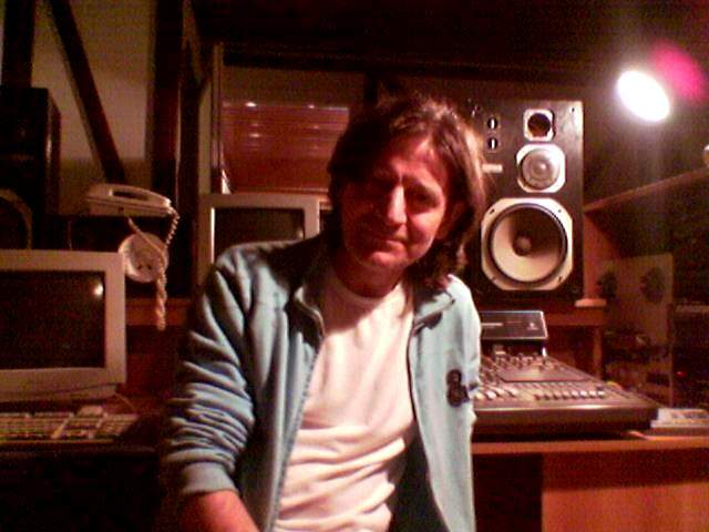 kendi çekimim.